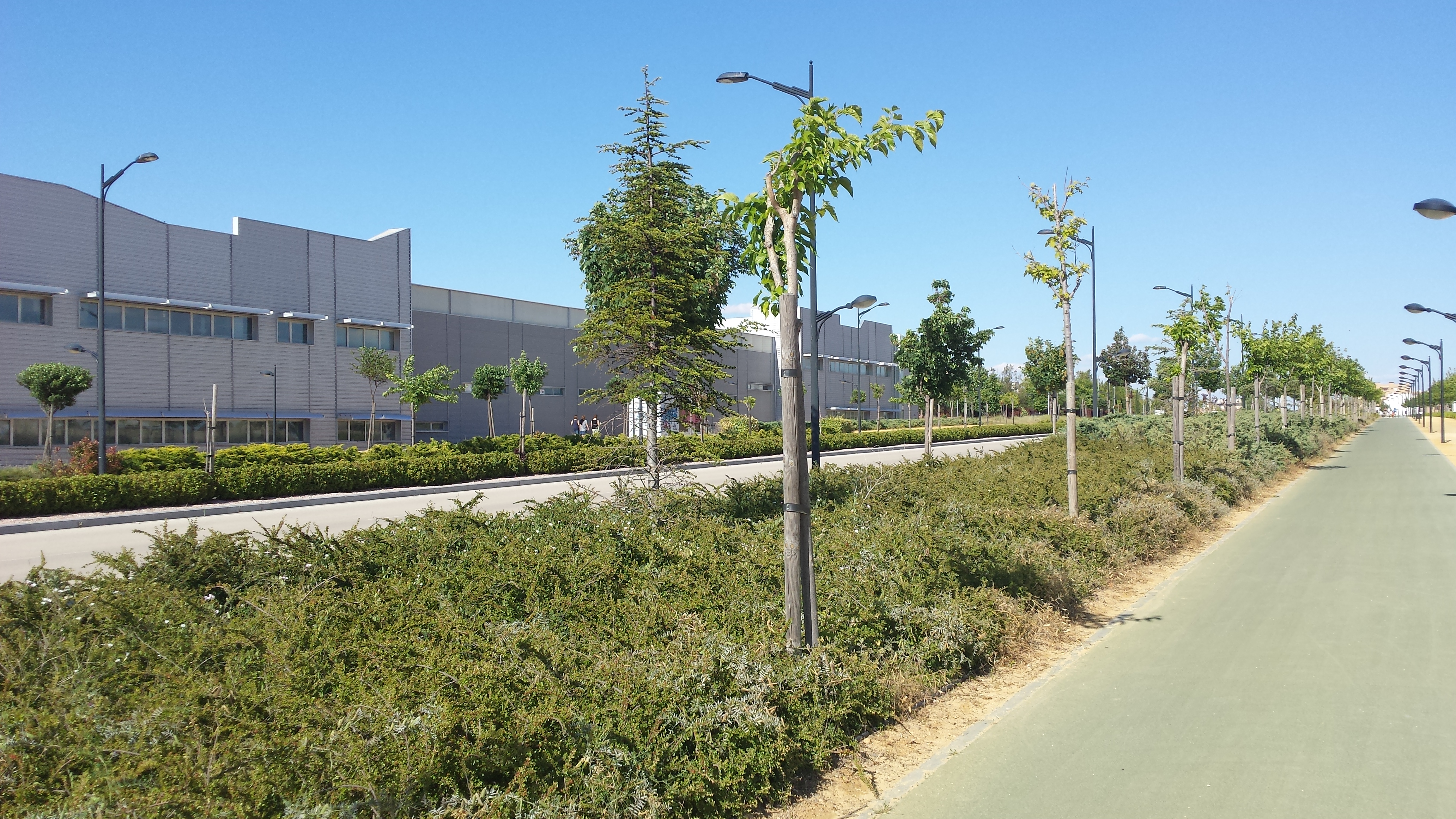 Avenida de La Mancha o AB-20. Vía Verde a La Pulgosa. Instituto de Investigación en Energías Renovables (IER) Instituto de Desarrollo Industrial (IDI) Parque Científico y Tecnológico de Albacete (PCYTA). Albacete